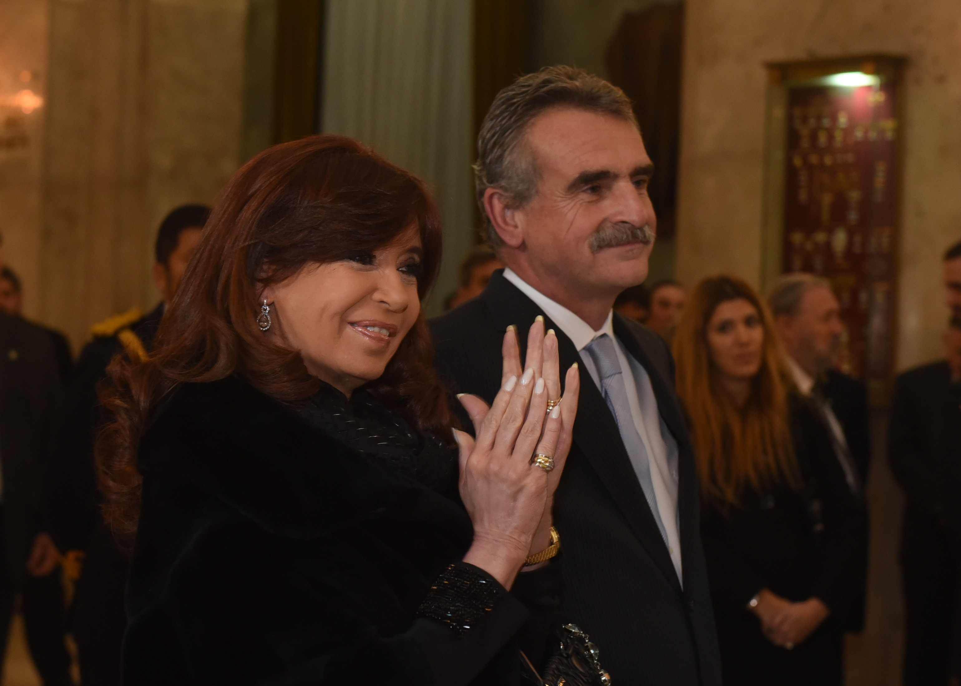 Agustin Rossi y Cristina Fernandez de Kirchner